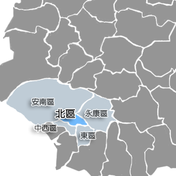 北區相對位置